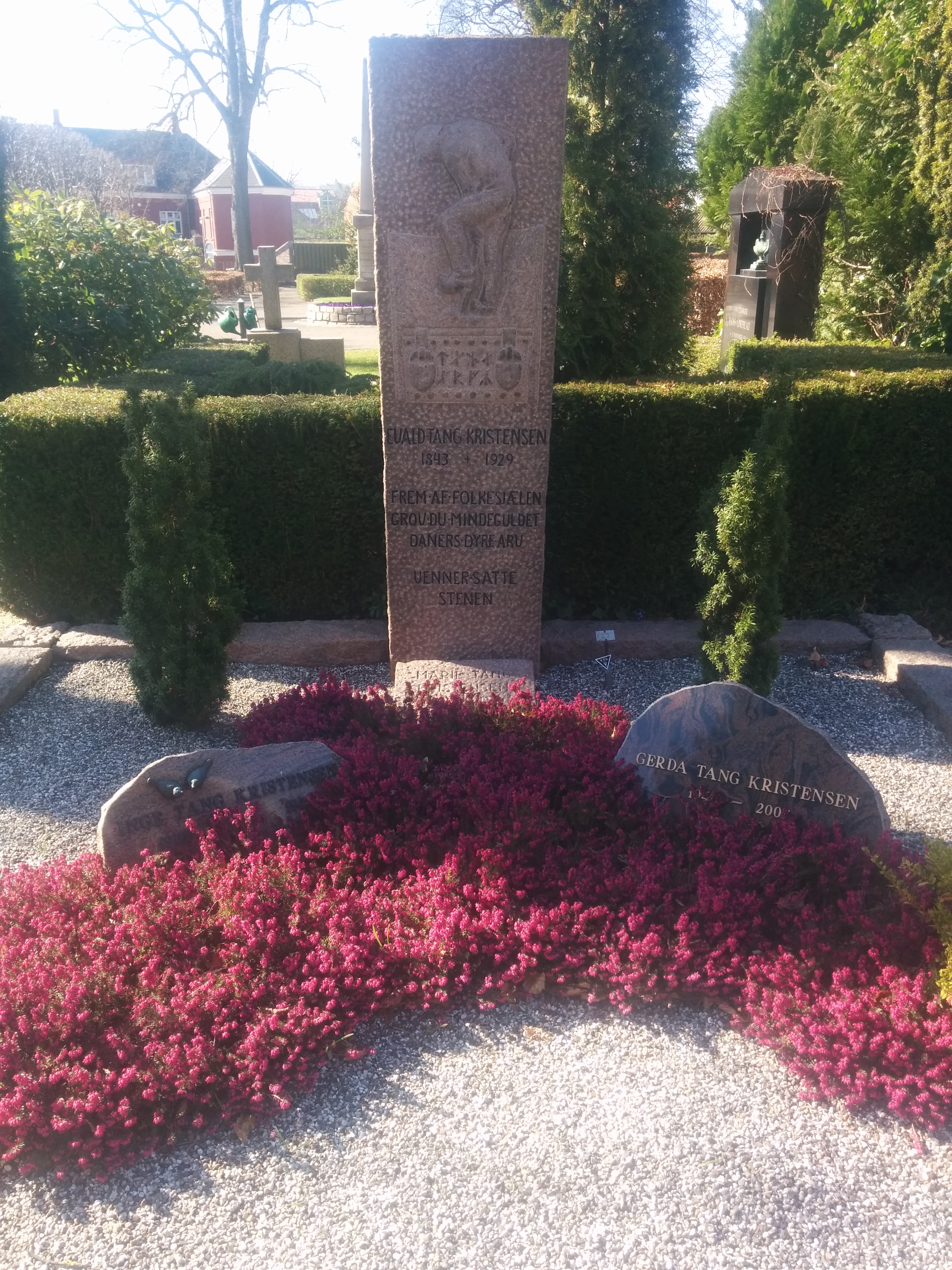 Evald Tang Kristensen er begravet på Vejle gamle kirkegård. Han var Danmarks største folkemindesamler, og indsamlede over 30.000 folkeminder, sagn, eventyr, viser, sange, gåder m.m.